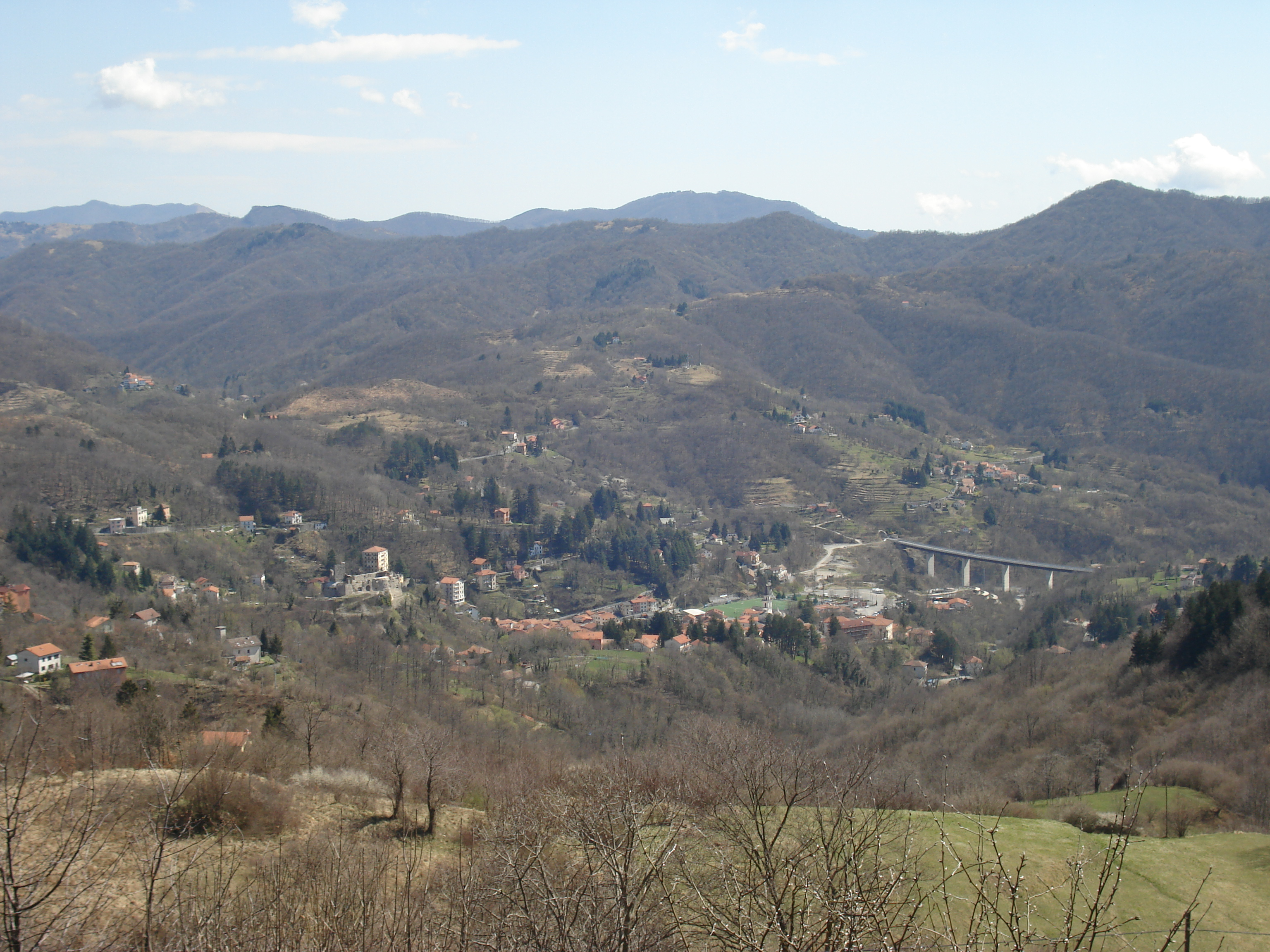 Cosmin latan,05-04-2008,Torriglia